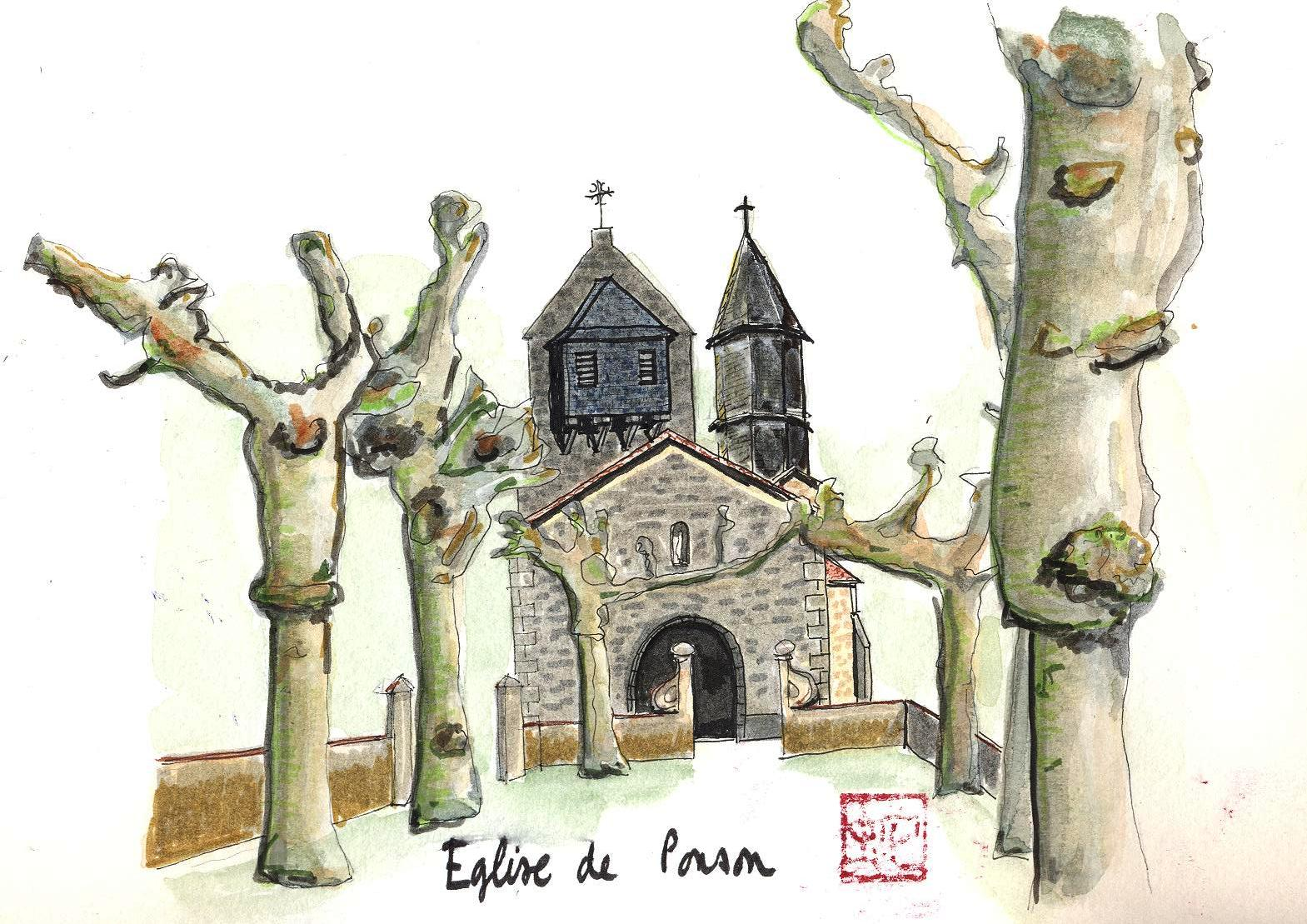 Aquarelle de l'église de Ponson sur la commune de Carcen-Ponson dans le département français des Landes.